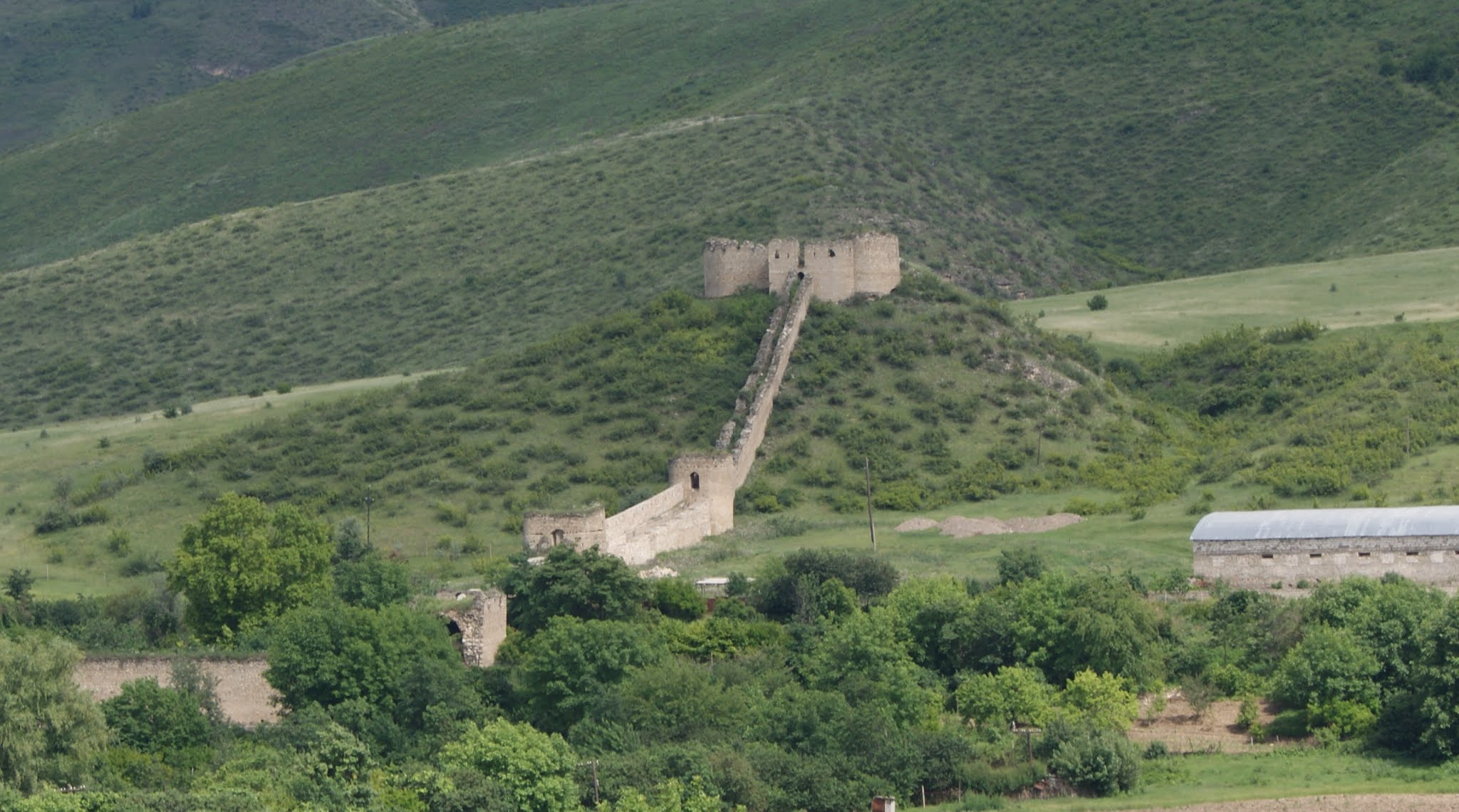 Əsgəran qalası